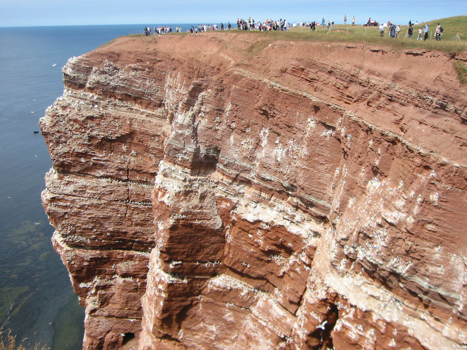 "Lummenfelsen", Heligoland